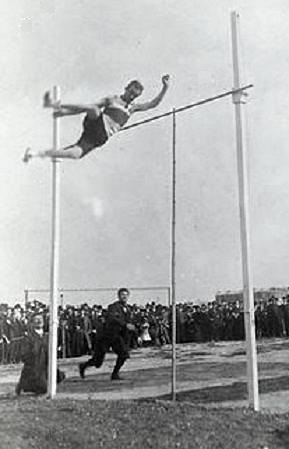 [Collection Jules Beau. Photographie sportive] : T. 29. Année 1905 / Jules Beau